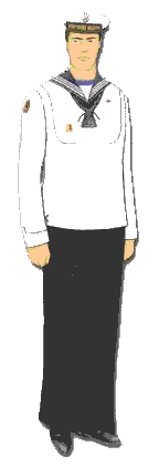 Rysunek ten pochodzi z załącznika do rozporządzenia ministra obrony narodowej z dnia 2 grudnia 2004 r. w sprawie wzorów oraz noszenia umundurowania i oznak wojskowych przez żołnierzy zawodowych i kandydatów na żołnierzy zawodowych.